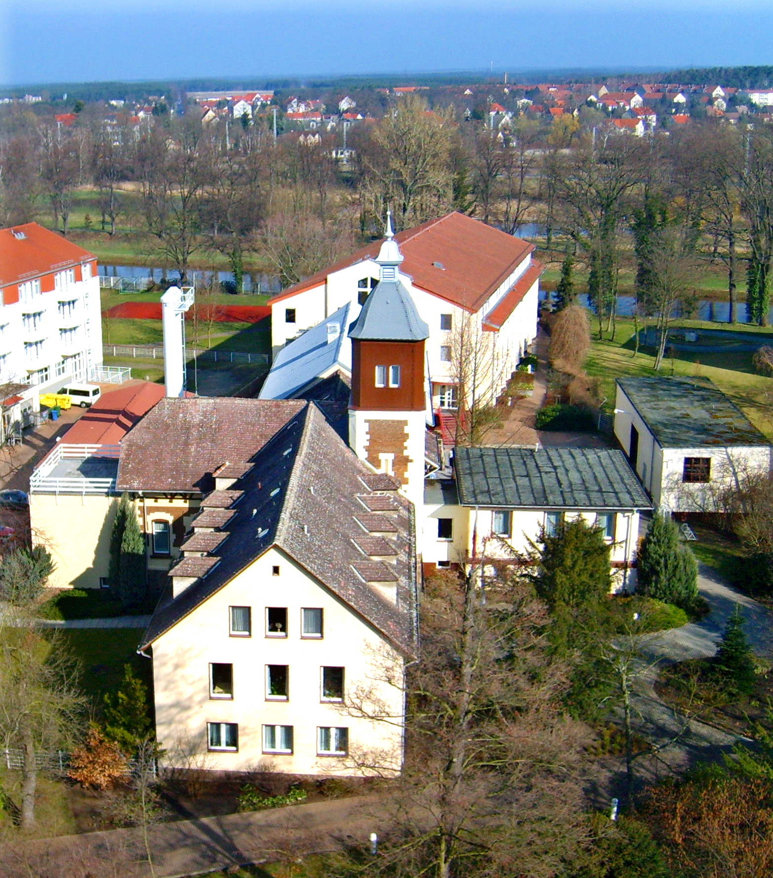 Das Moorbad in Bad Liebenwerda vom Lubwartturm gesehen.